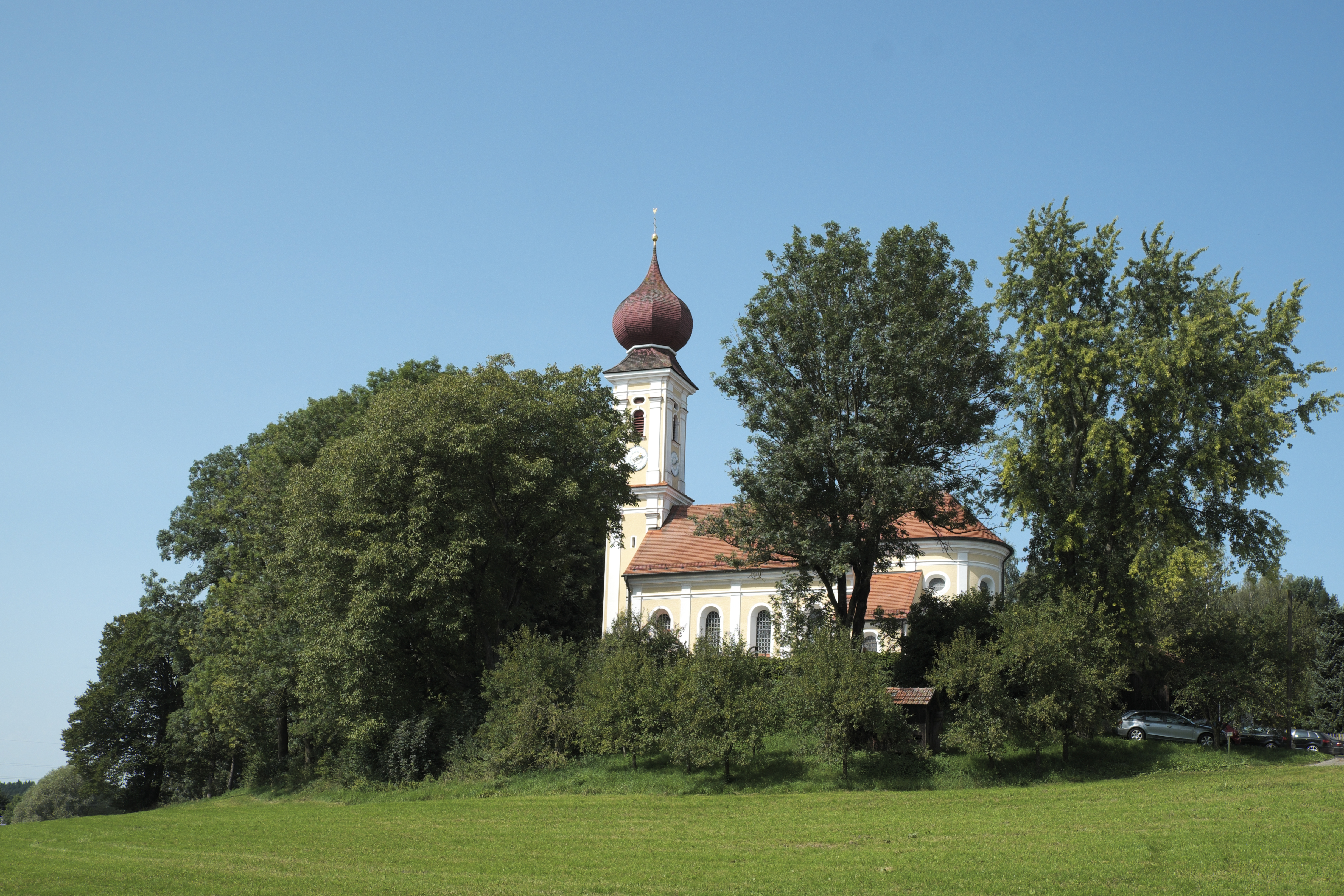 Katholische Filialkirche St. Peter und Paul in Kirchberg im Landkreis Erding (Bayern/Deutschland)